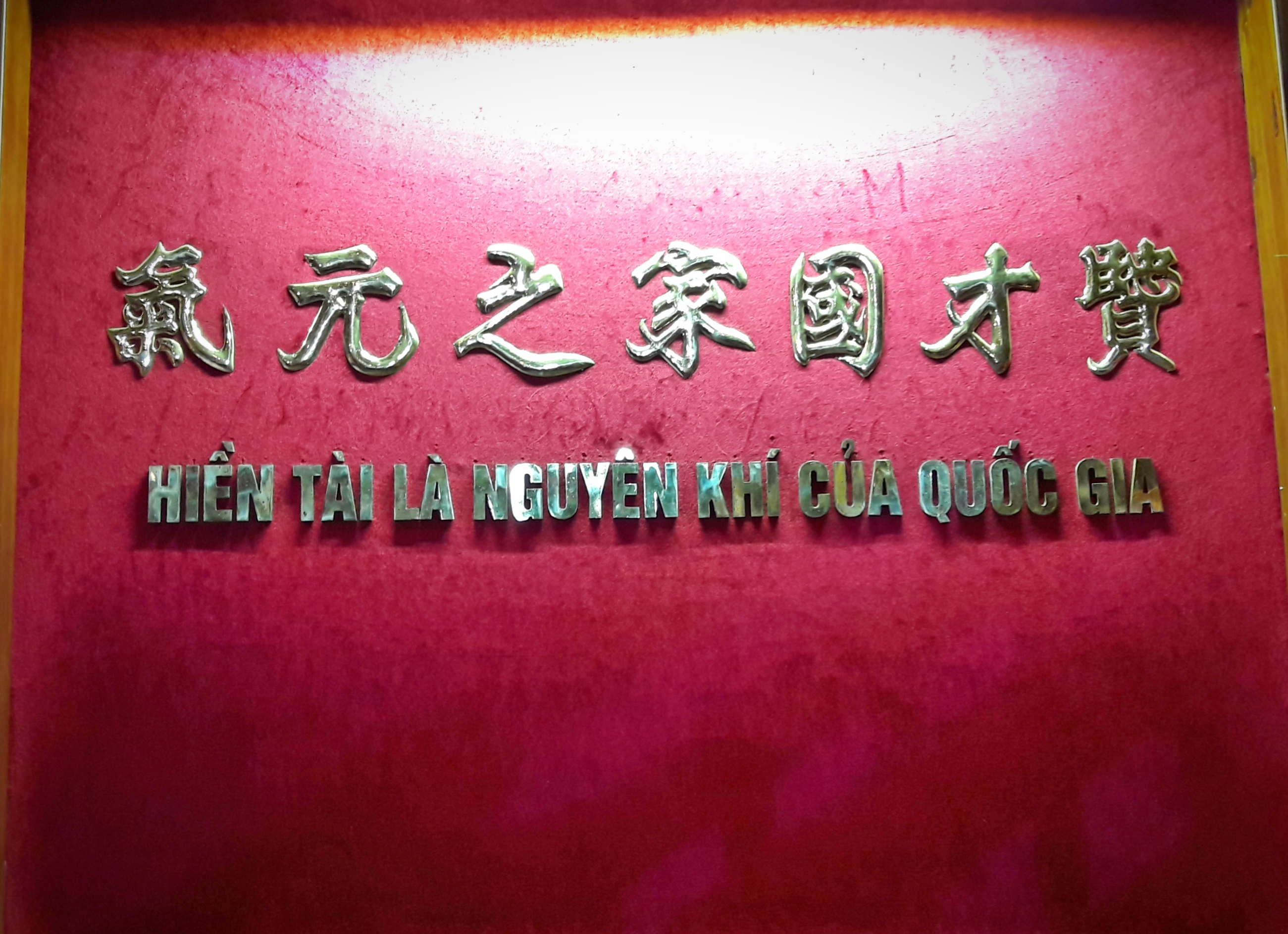 "Hiền tài là nguyên khí của quốc gia." - Thân Nhân Trung (1419 - 1499)